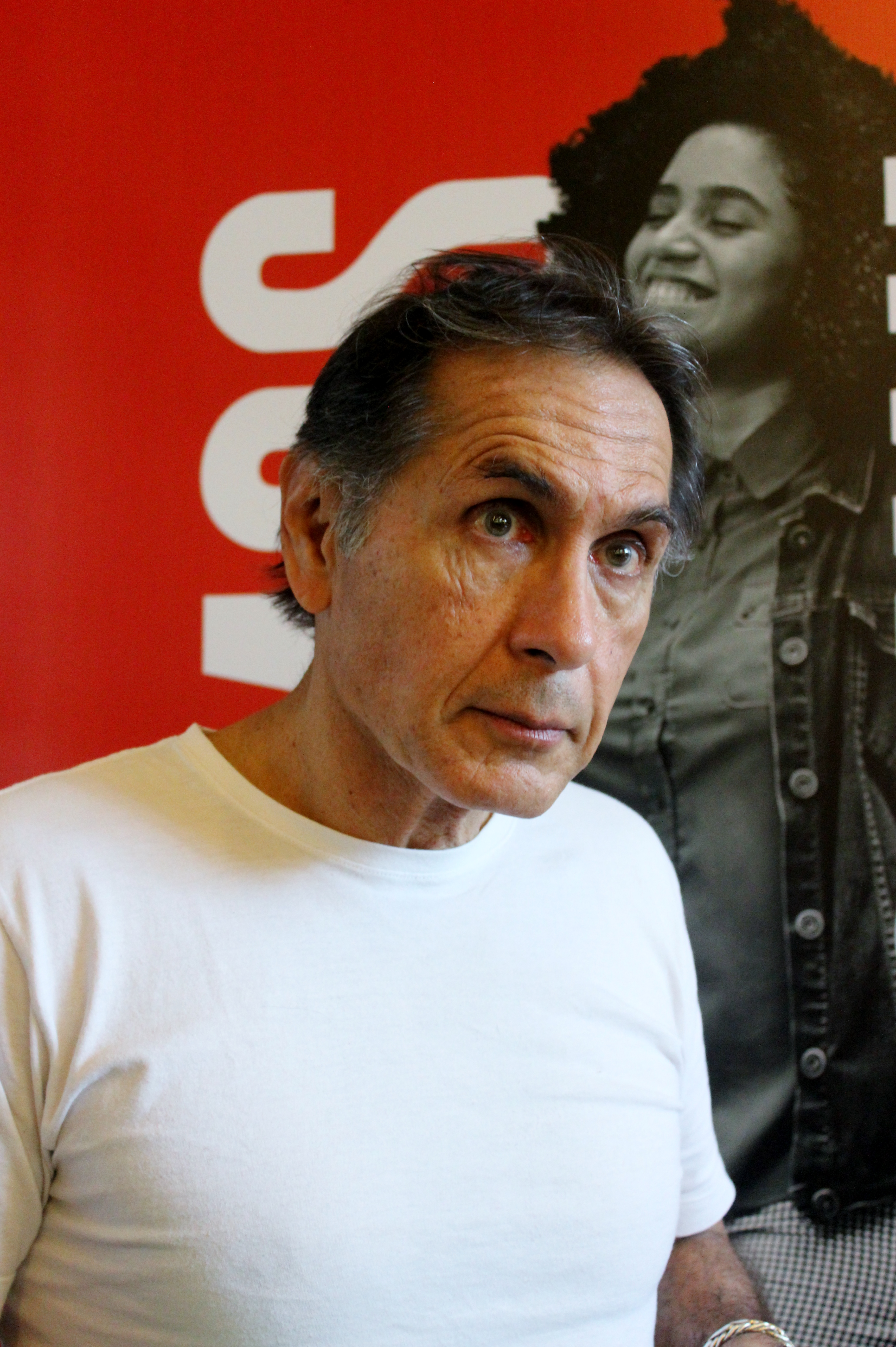 El profesor y escritor peruano Jorge Eslava durante la presentación de los textos para docentes Placer ausente, Paisaje de la mañana y Zona de encuentro, realizada en la Feria Internacional del Libro de Santiago 2018 (sala Lily Garafulic, 7 de noviembre).